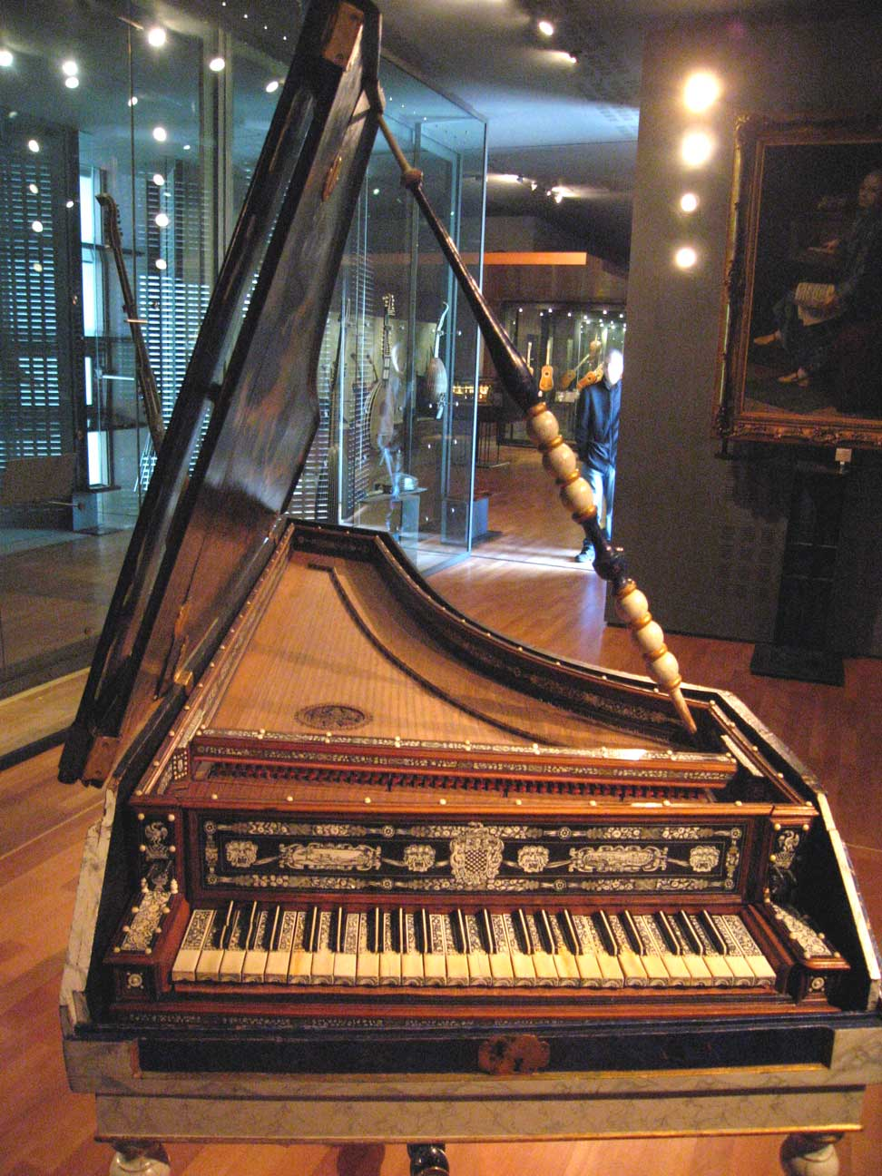 Description : Musee de la Musique de Paris Place : Parc de la Villette, Paris, France Date : juillet 2006 Auteur : Pline photo personnelle